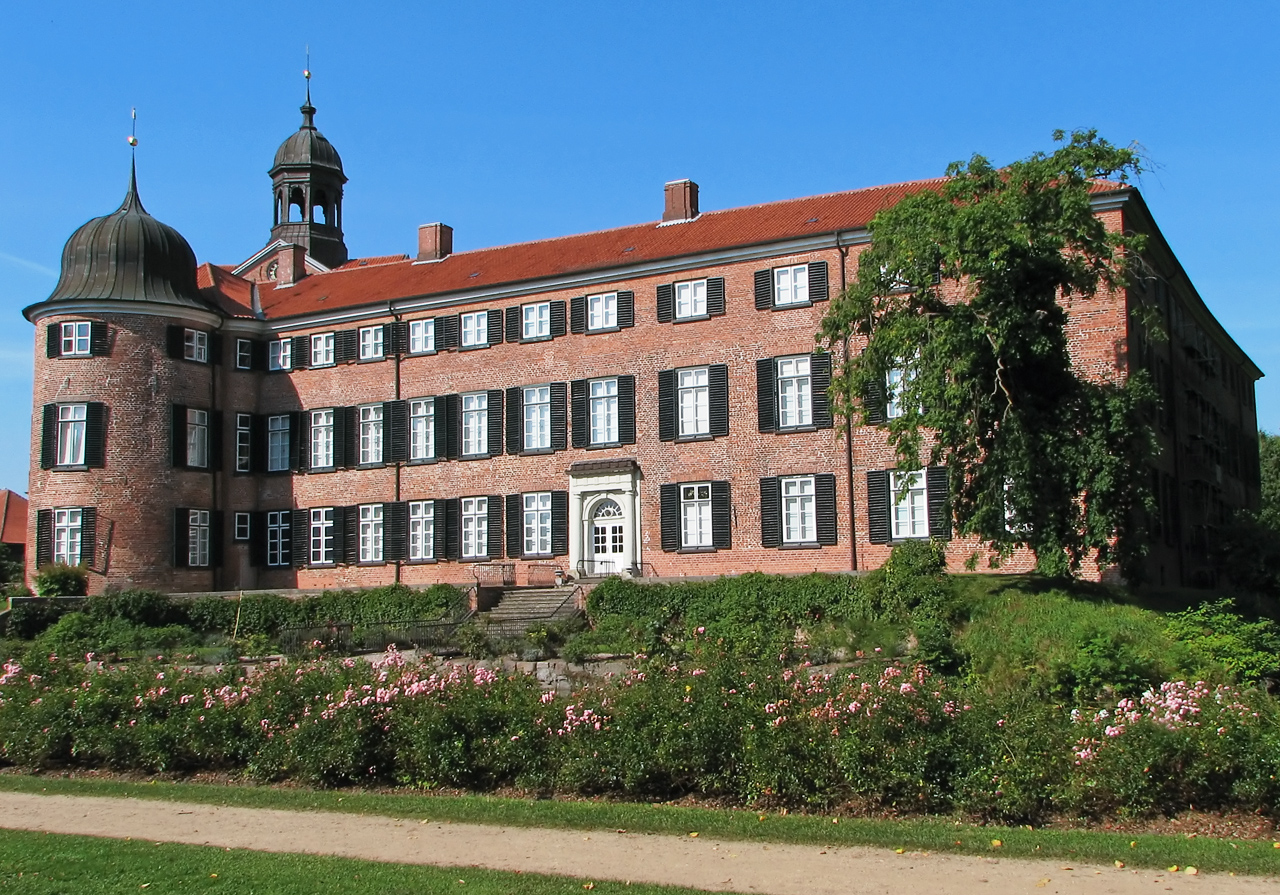 Beschreibung: Eutiner Schloss Fotograf: Darkone, 5. September 2005